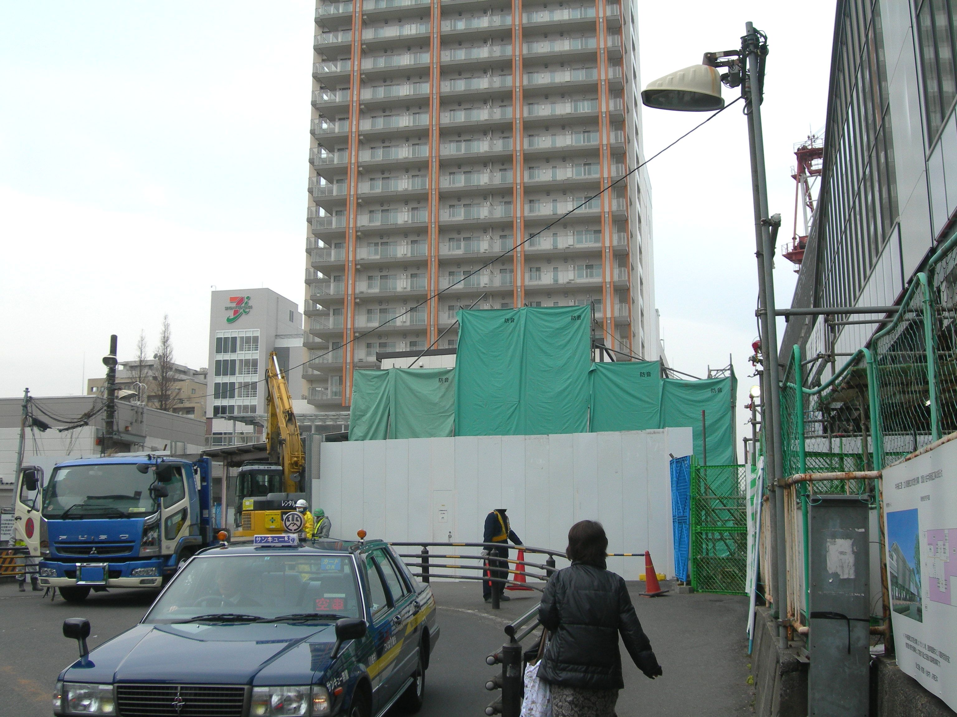 武蔵小金井駅南口